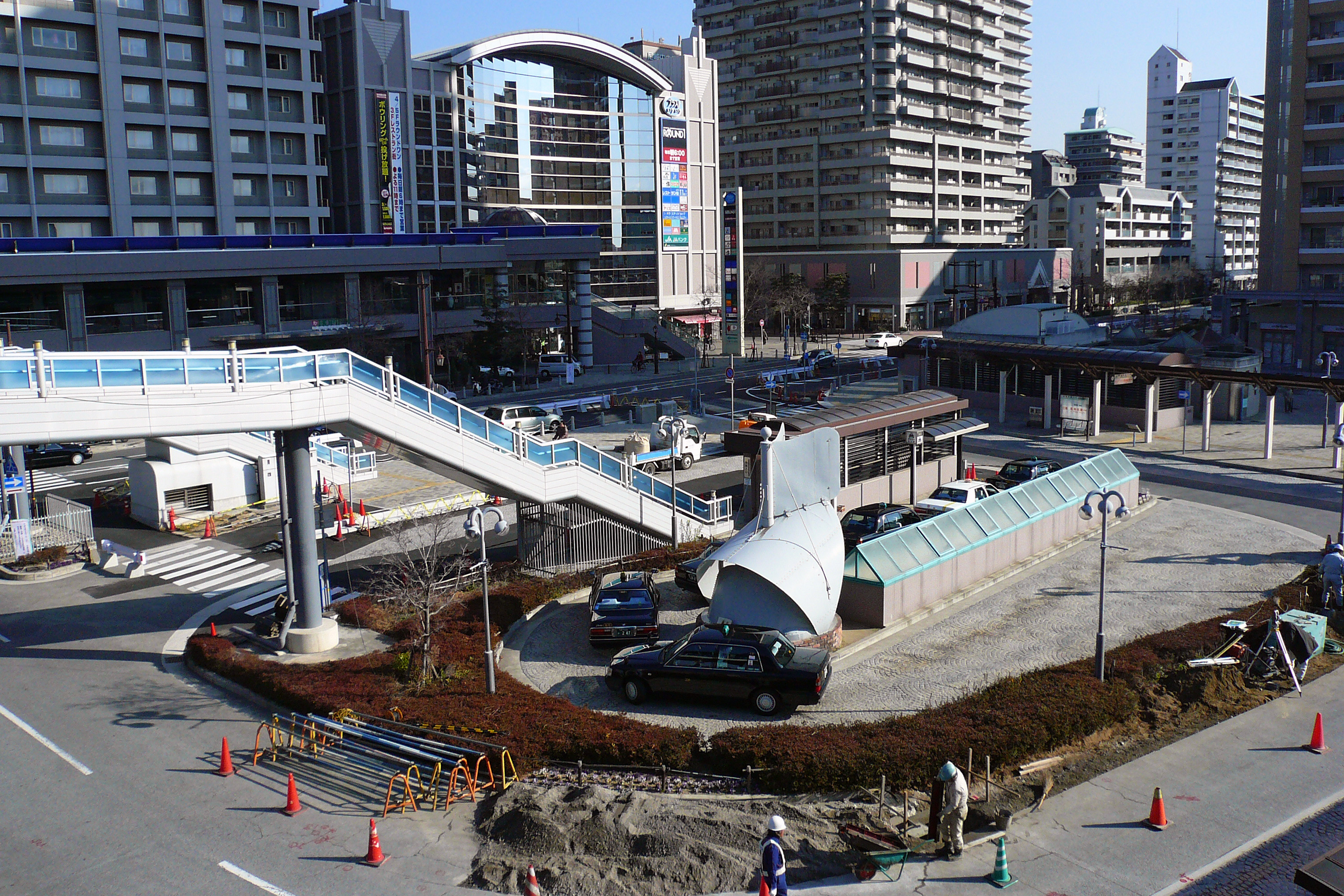 JR Amagasaki Station in Amagasaki, Hyogo, Japan